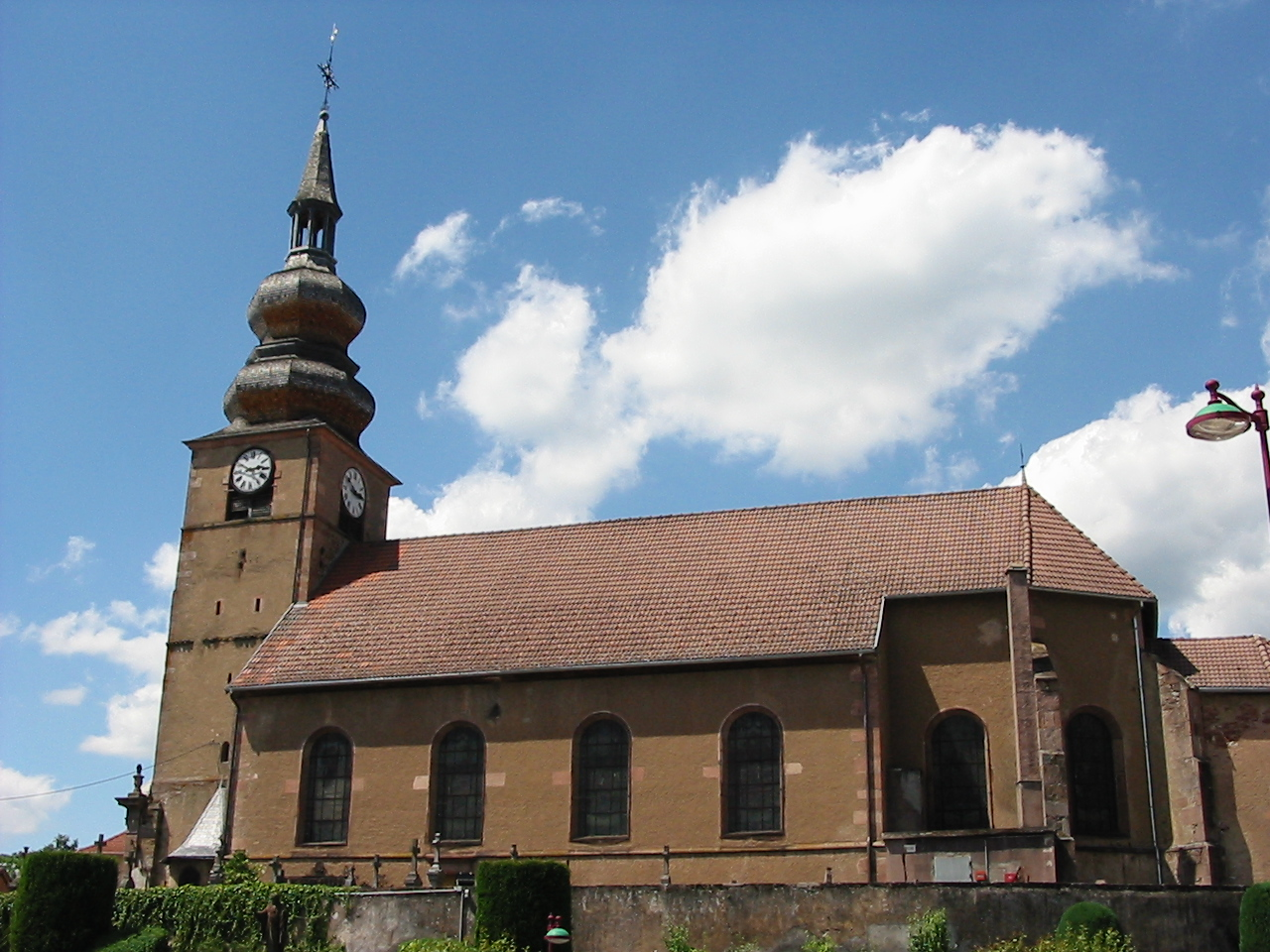 Provenchères-sur-Fave (88-Vosges). Église Sainte-Catherine.